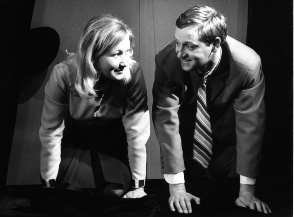 Igor Torkar, Balada o črnem noju, Mestno gledališče ljubljansko. Na fotografiji: Dare Valič (Izidor) in Nadja Vidmar (Malka).